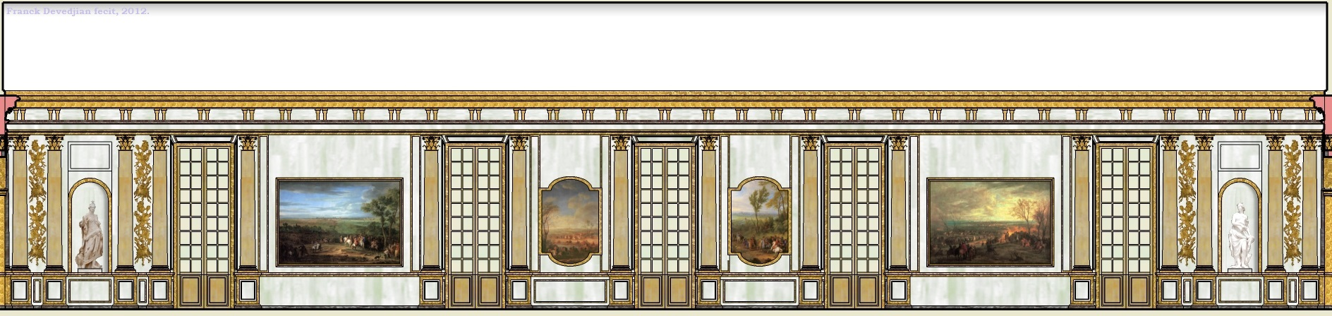 Essai de restitution de la coupe de la galerie du Château-Vieux de Meudon.